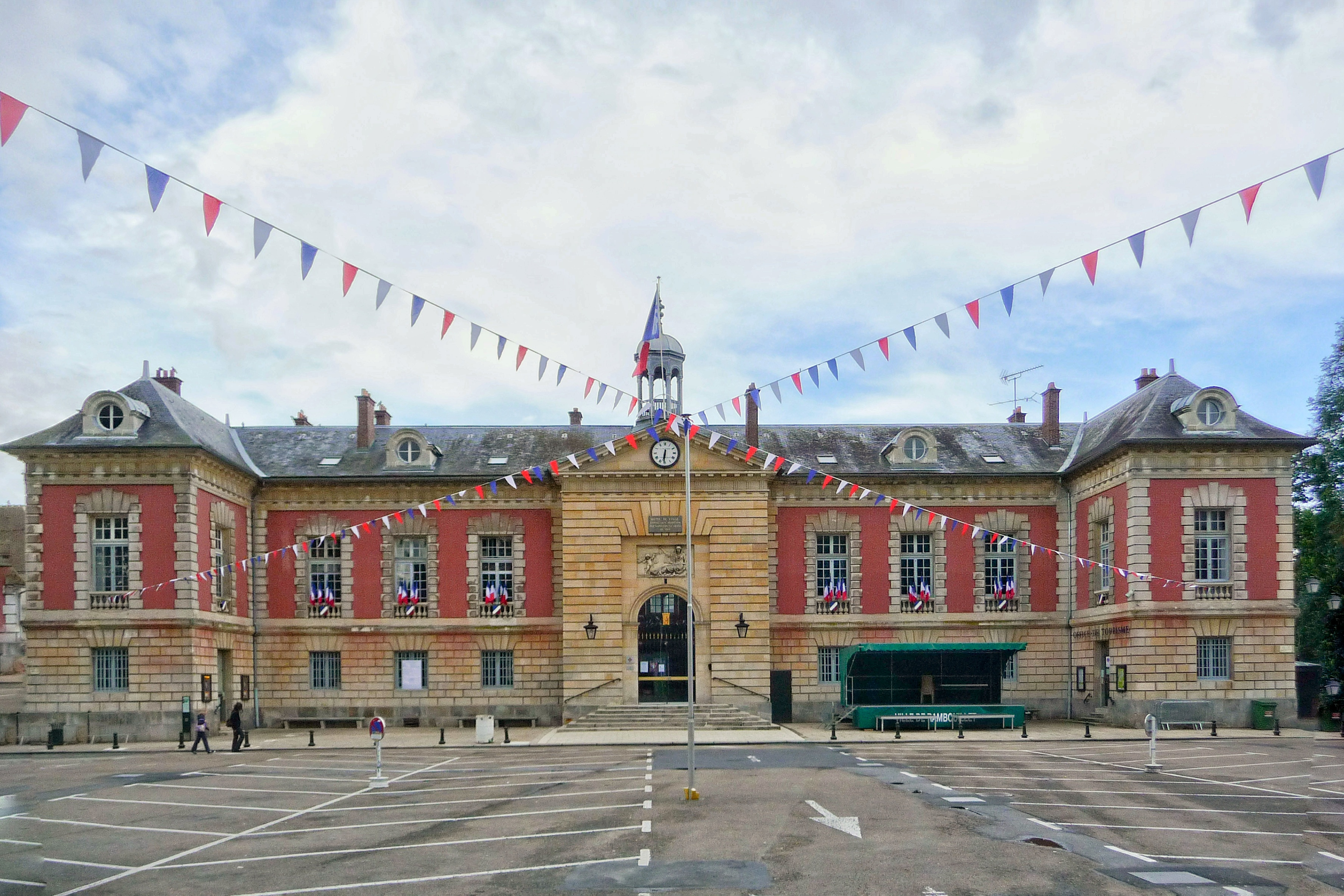 La Mairie de Rambouillet, le 14 juillet 2012.